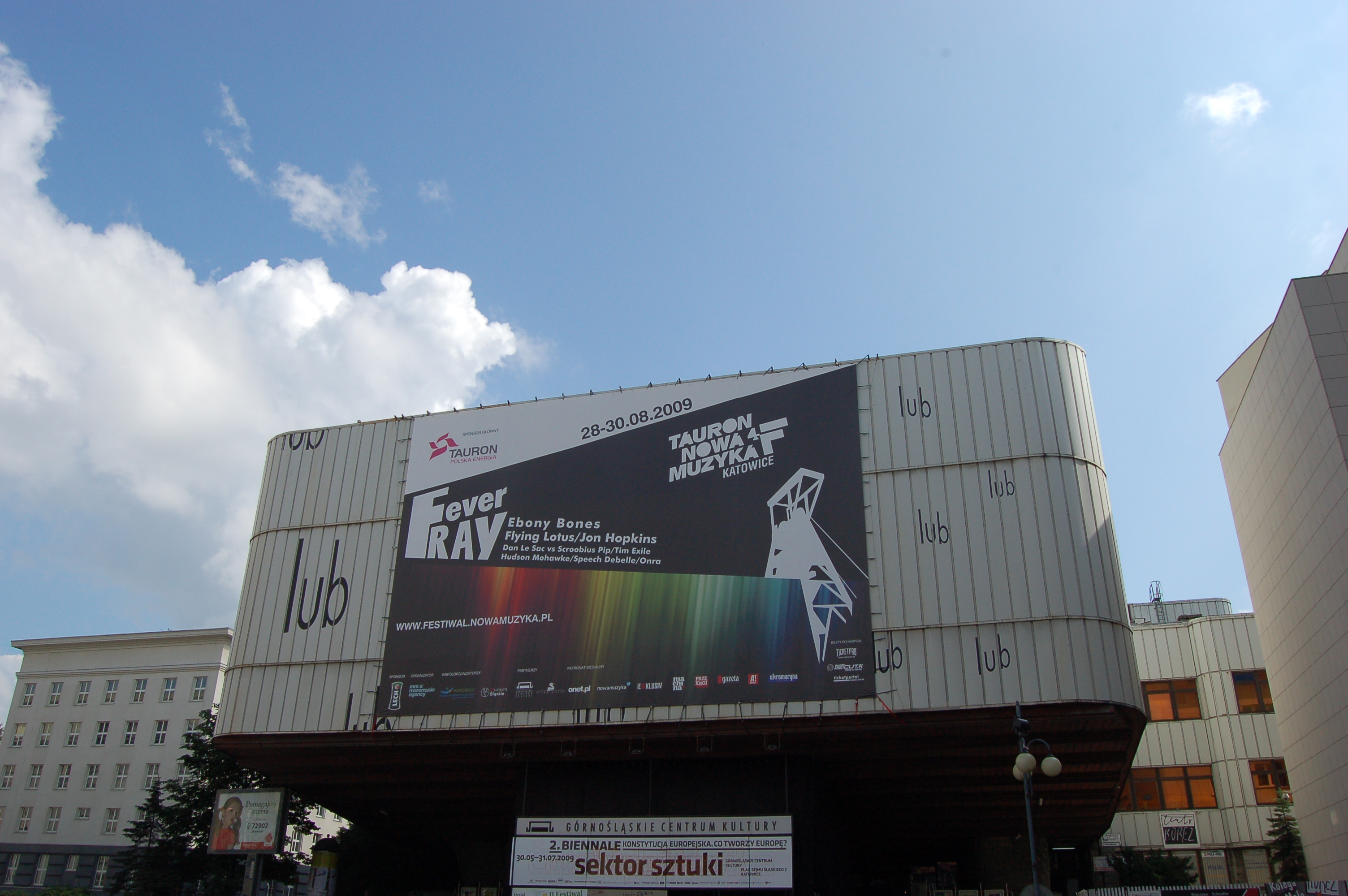 Katowice Plac Sejmu Śląskiego. Górnośląskie Centrum Kultury (oD 1 lipca 2010 - Centrum Kultury Katowice im. Krystyny Bochenek.) Upper Silesian Culture Center